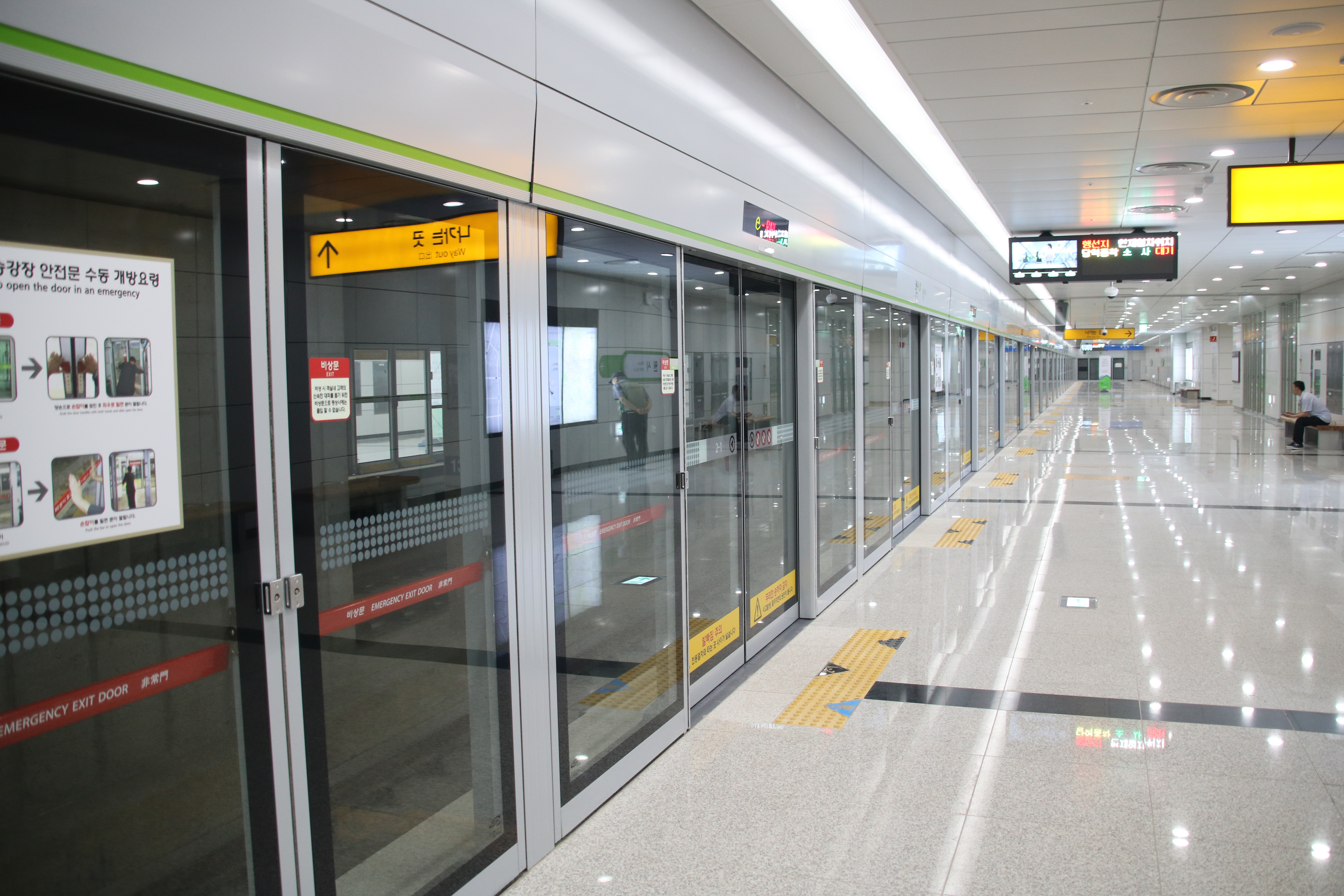 원시역 승강장